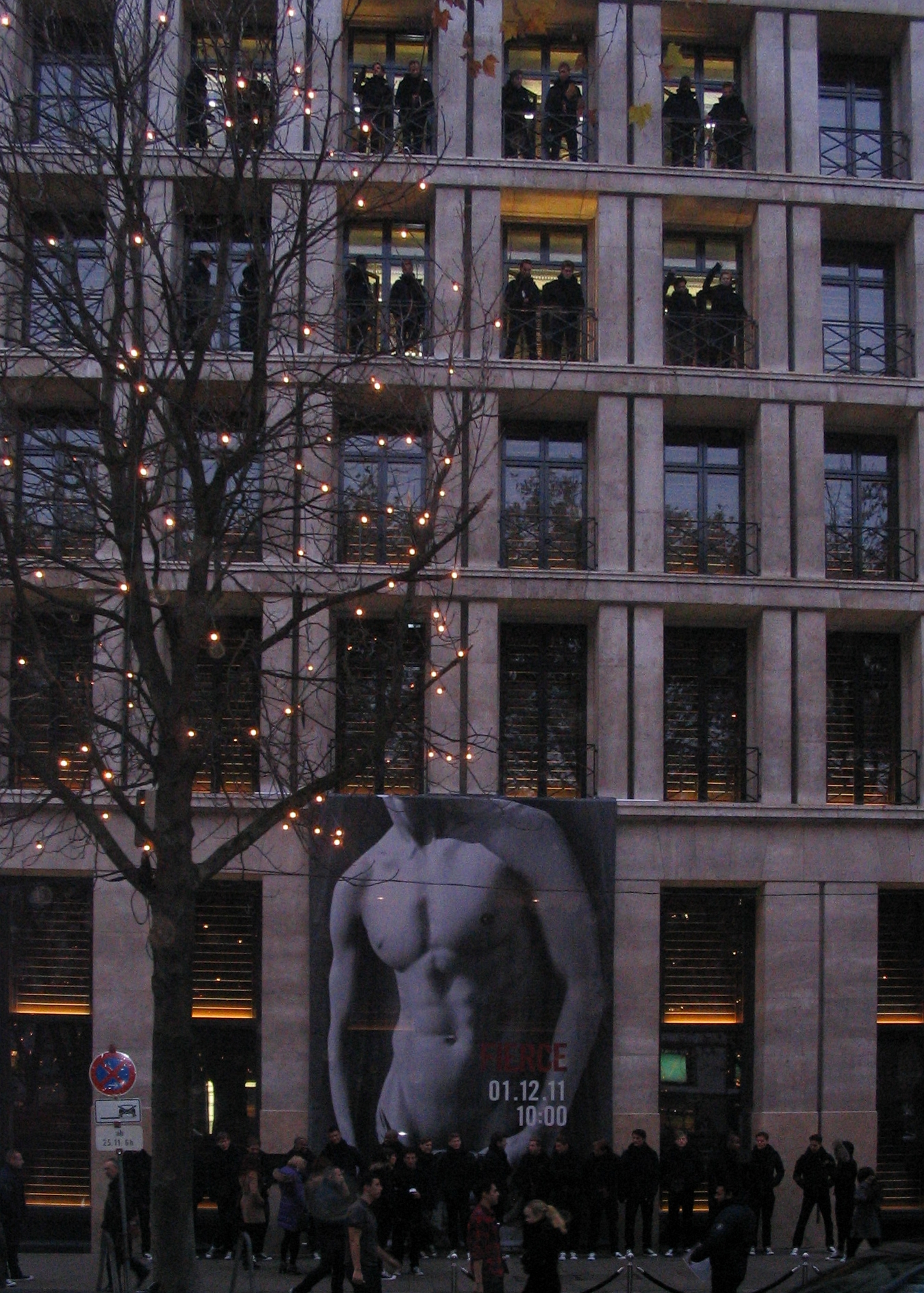 Abercrombie, Düsseldorf Königsallee. 5 Tage vor der Eröffnung stehen bereits die attraktiven Dressmen Spalier. Zitat: "Ganz nach der Tradition von Abercrombie & Fitch werden in der Woche vor der Shoperöffnung die heißesten Models der Marke aus den USA, Japan, Italien, England, Frankreich, Dänemark, Spanien und Deutschland an den Eingängen zum Flagship-Store stehen."